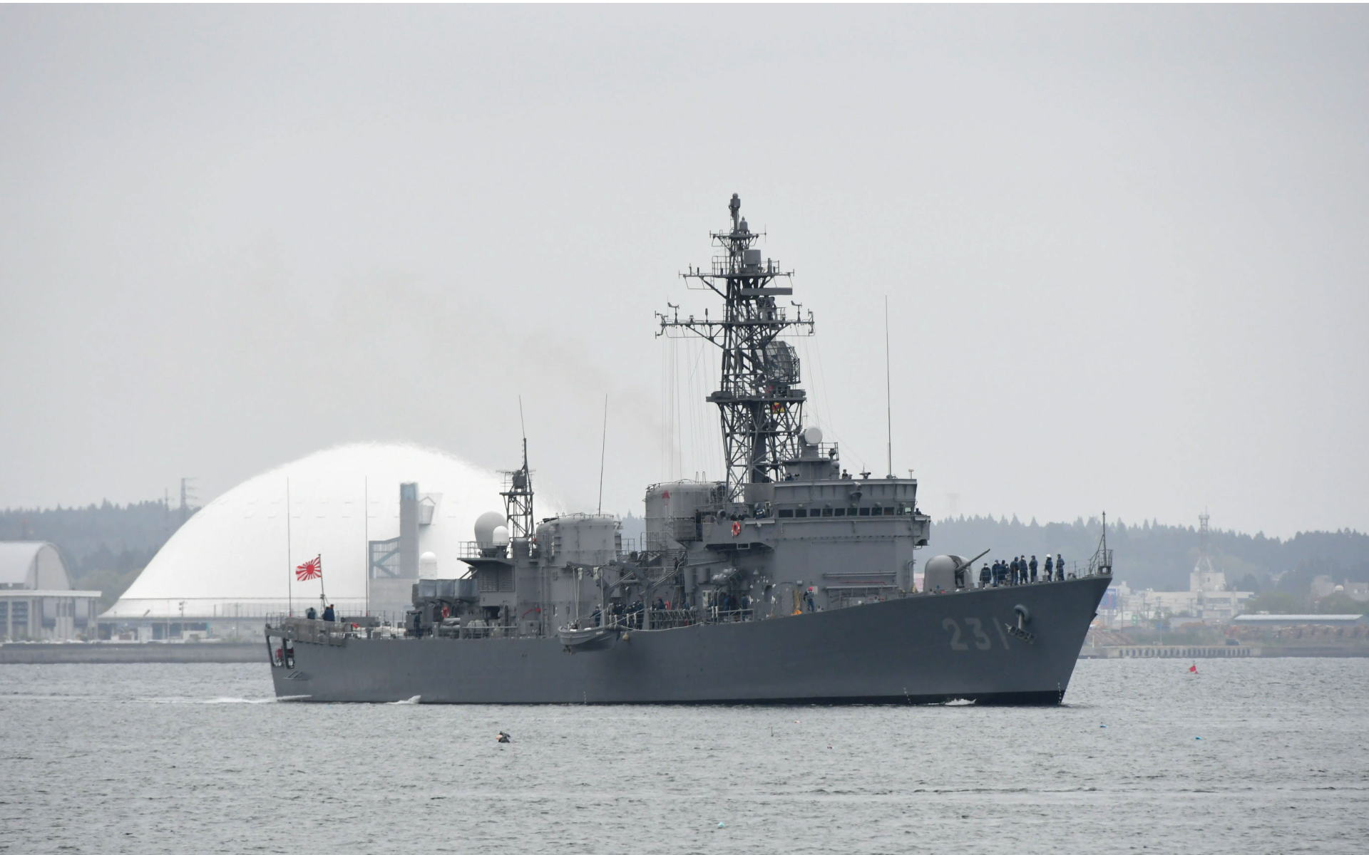 ロービジ船体塗装で大湊に入港する護衛艦「おおよど」